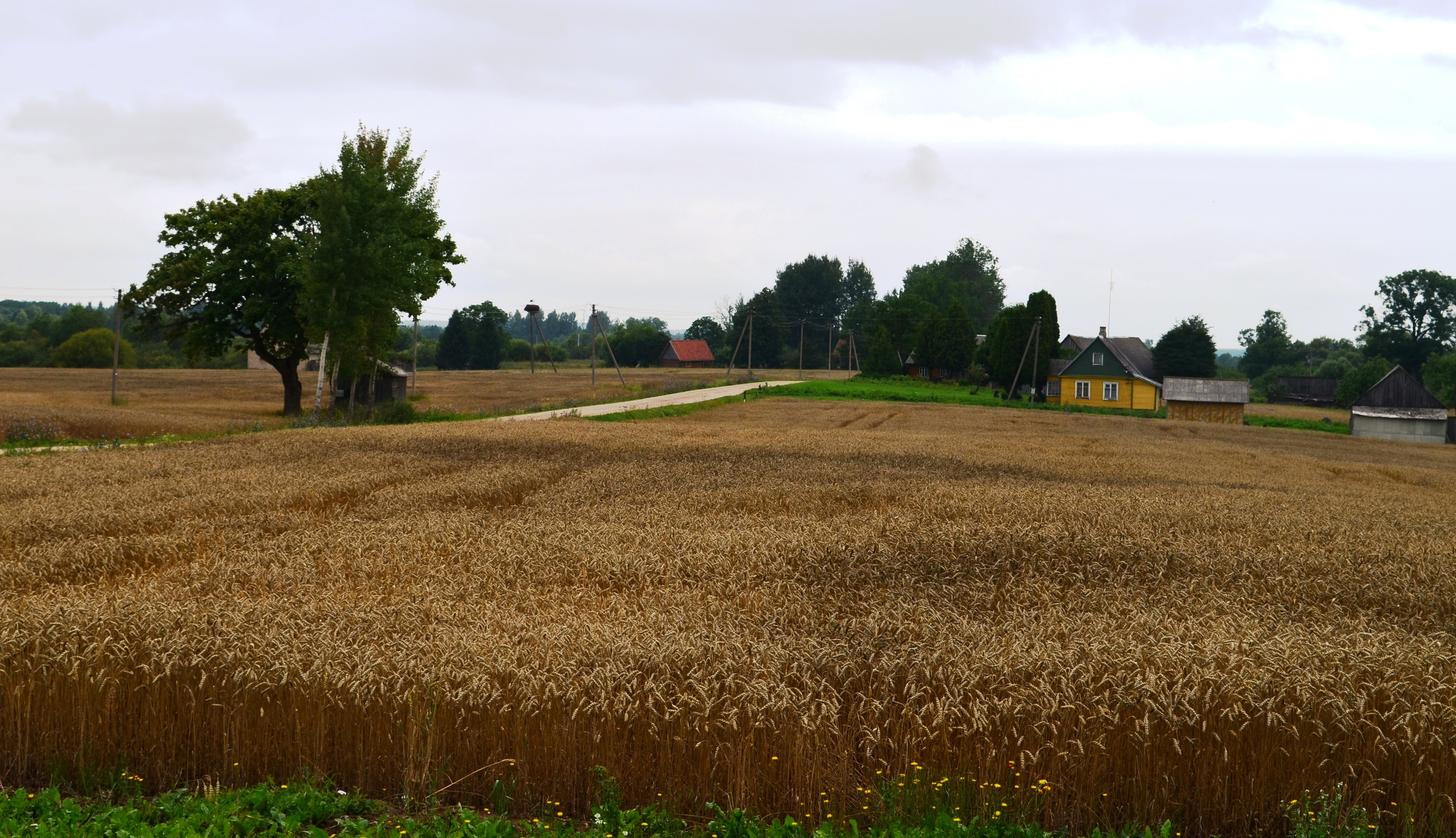 Margėnai, Rokiškio r.